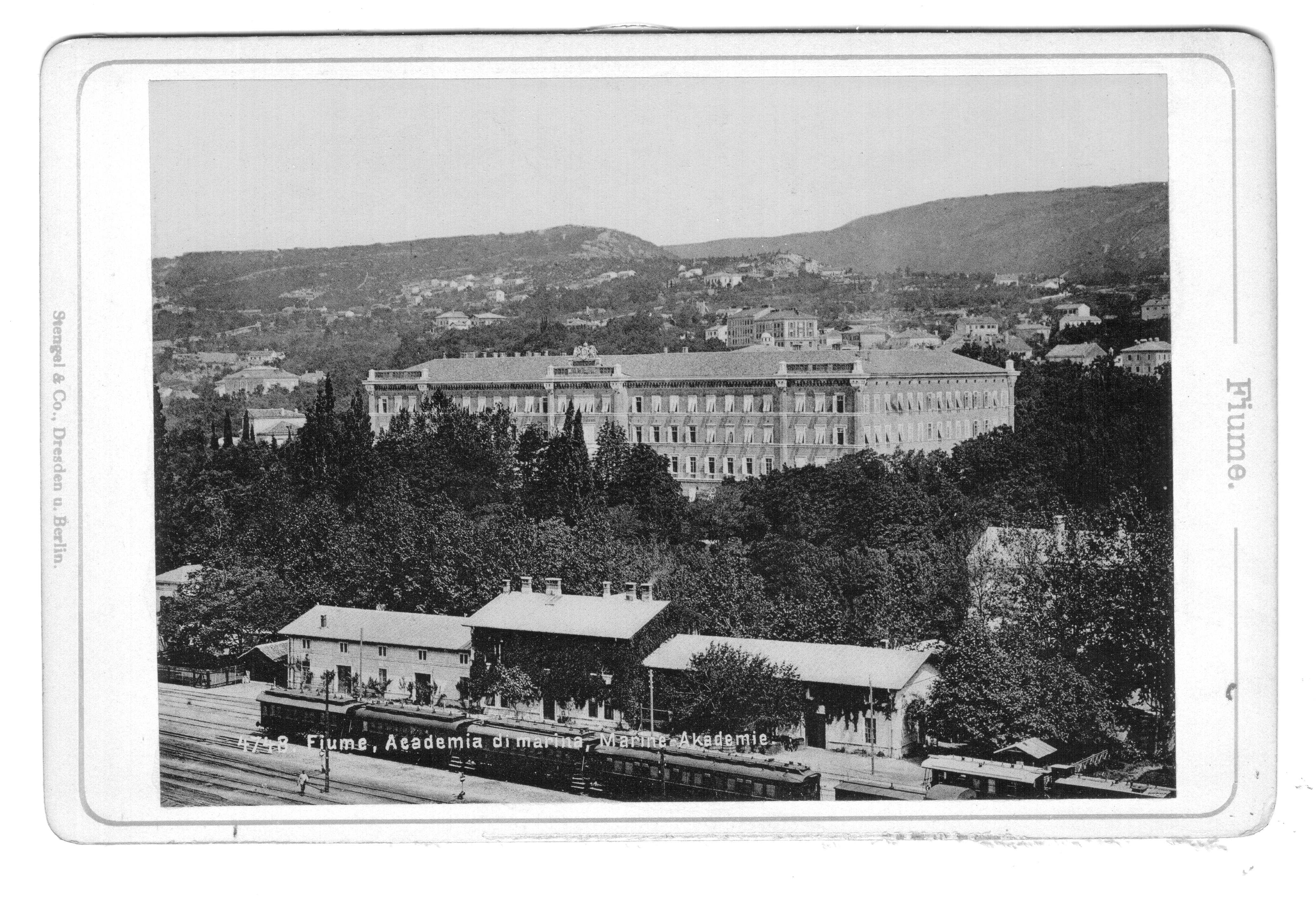 Magyar Királyság, Fiume. Edoardo Schambik fényképész. PD-old. A FIUME című fényképalbum 12, fehér vászonnal összefűzött fényképe közül az utolsó fénykép hátoldalára ragasztott kék-fehér bélyeg szövege a következő: EDOARDO SCHAMBIK FIUME Corso No 13. ©© Megjelent Creative Commons alatt a Metapolisz sorozatban. A Metapolisz sorozat valamennyi képe és filmje Creative Commons alatti valamint kereskedelmi - for profit - célra is felhasználható. Ajánlott hivatkozás: Derzsi Elekes Andor: Metapolisz DVD line ©© Published under Creative Commons in the Metapolisz DVD line. All of the photos and vids in the Metapolisz DVD line are under Creative Commons and can be used even for commercial – for profit – purposes. Recommended Citation Derzsi Elekes Andor: Metapolisz DVD line